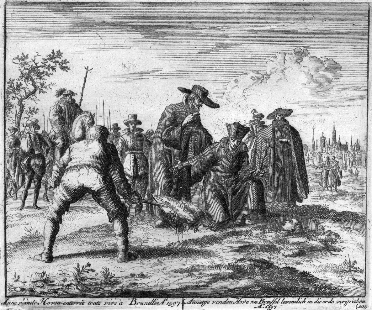 Anneken van den Hove levend begraven te Vilvoorde in 1597. Etsprent van Jan Luyken (Noordelijke Nederlanden, ca. 1683 - 1685) Uit: Theatre des martyrs, depuis la mort de J. Christ jusqu'à present (Leiden, ca. 1715) Hove zu Brussel levendich in die erde vergraben, Ao. 1597